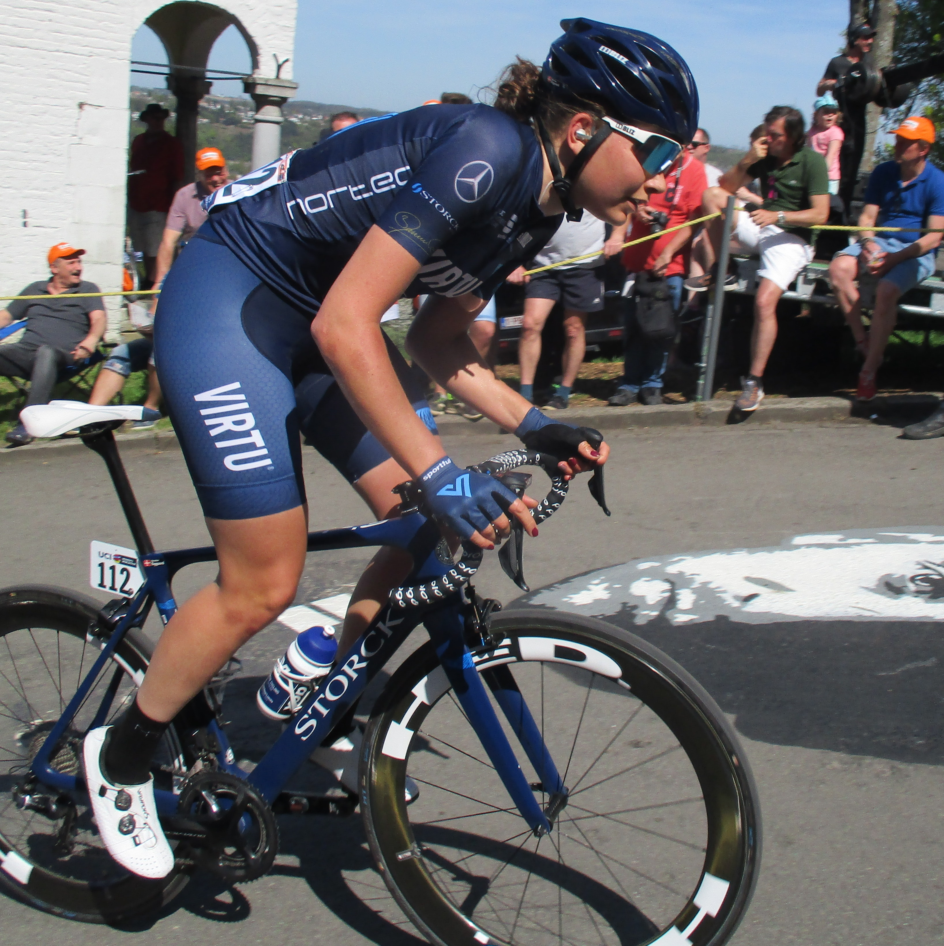 1e passage van de Waalse Pijl 2018 op de Mur van Huy.